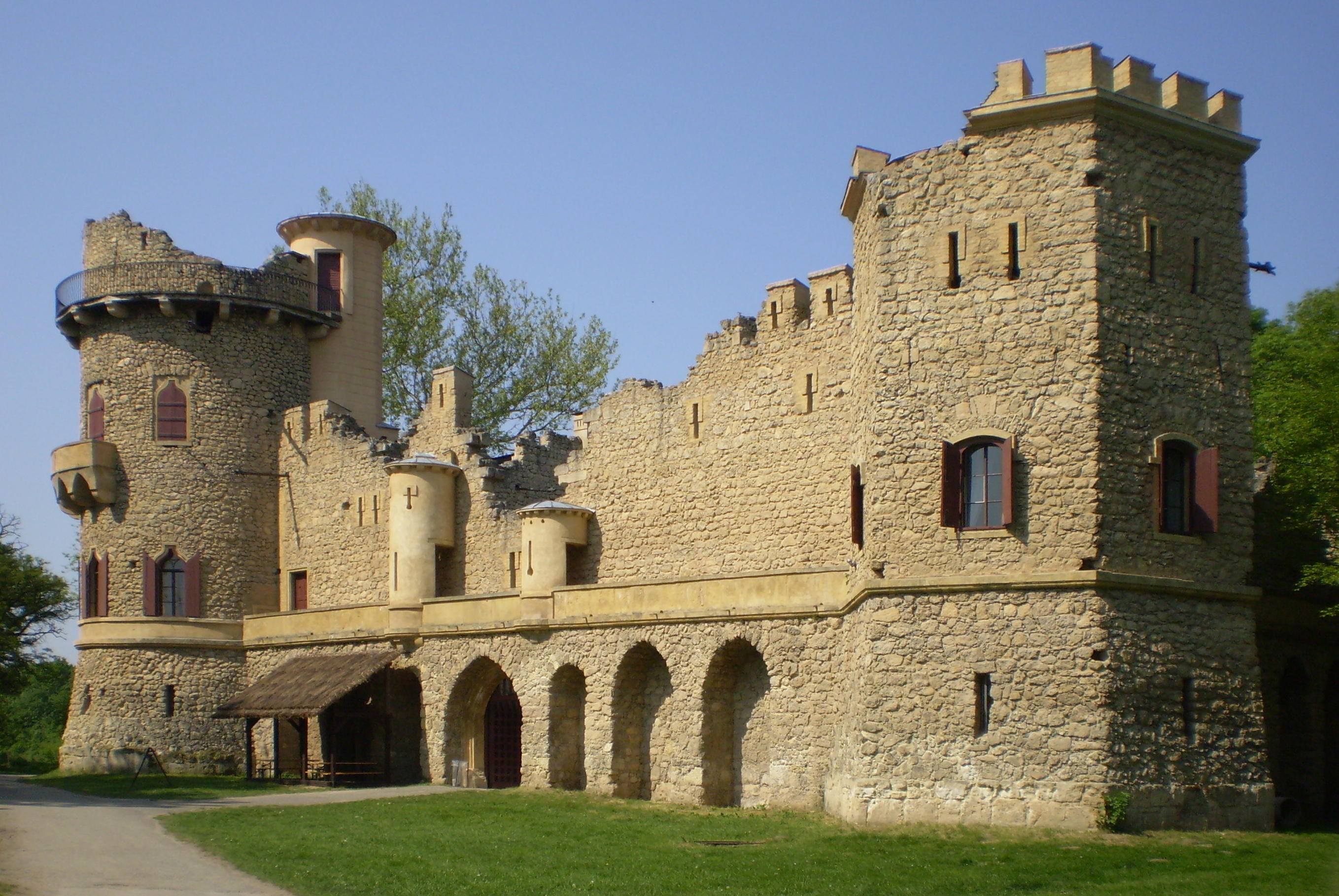 Janův hrad, Lednicko-valtický areál.